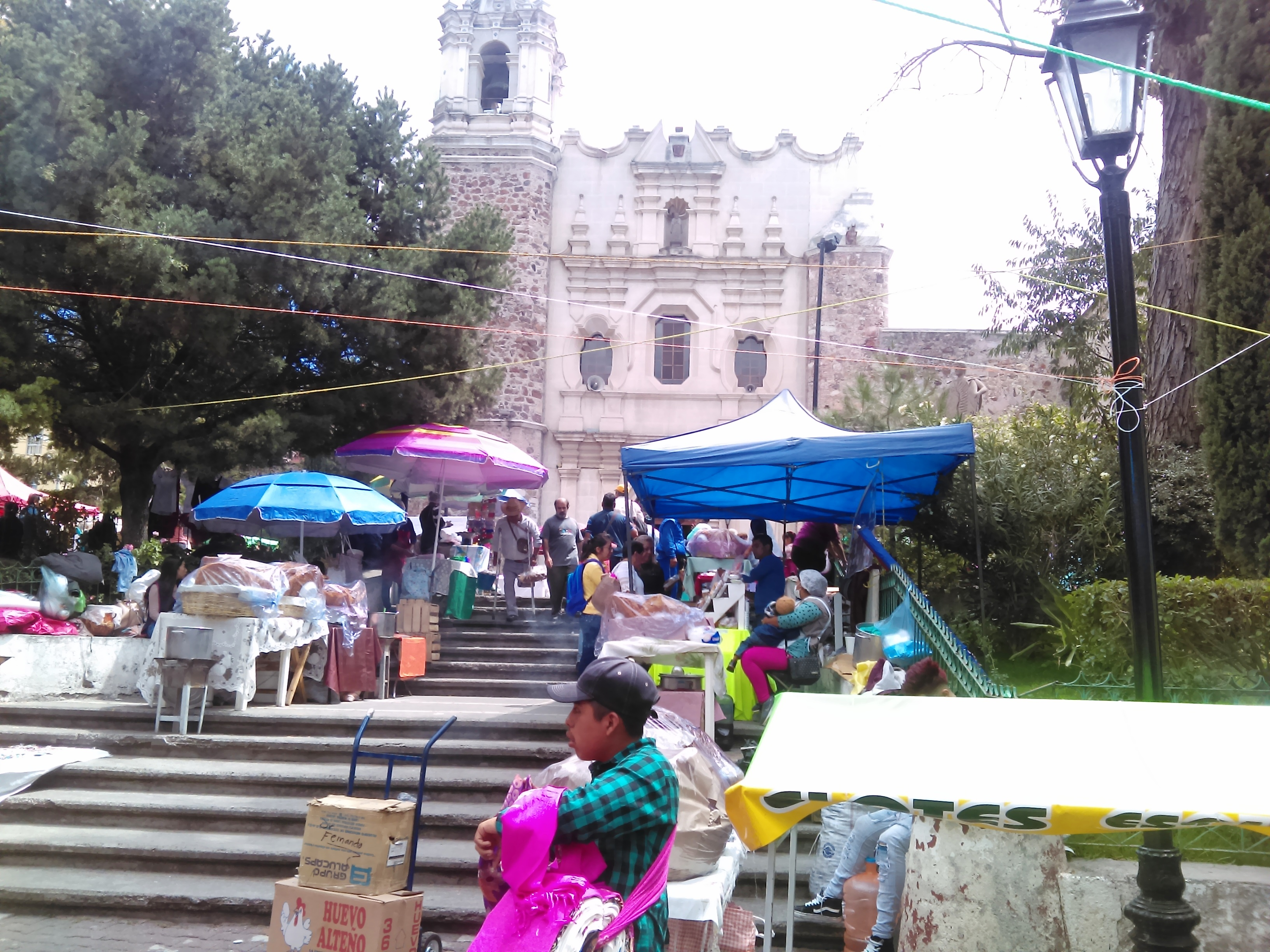 Feria Tradicional San Francisco Pachuca 2019. 01